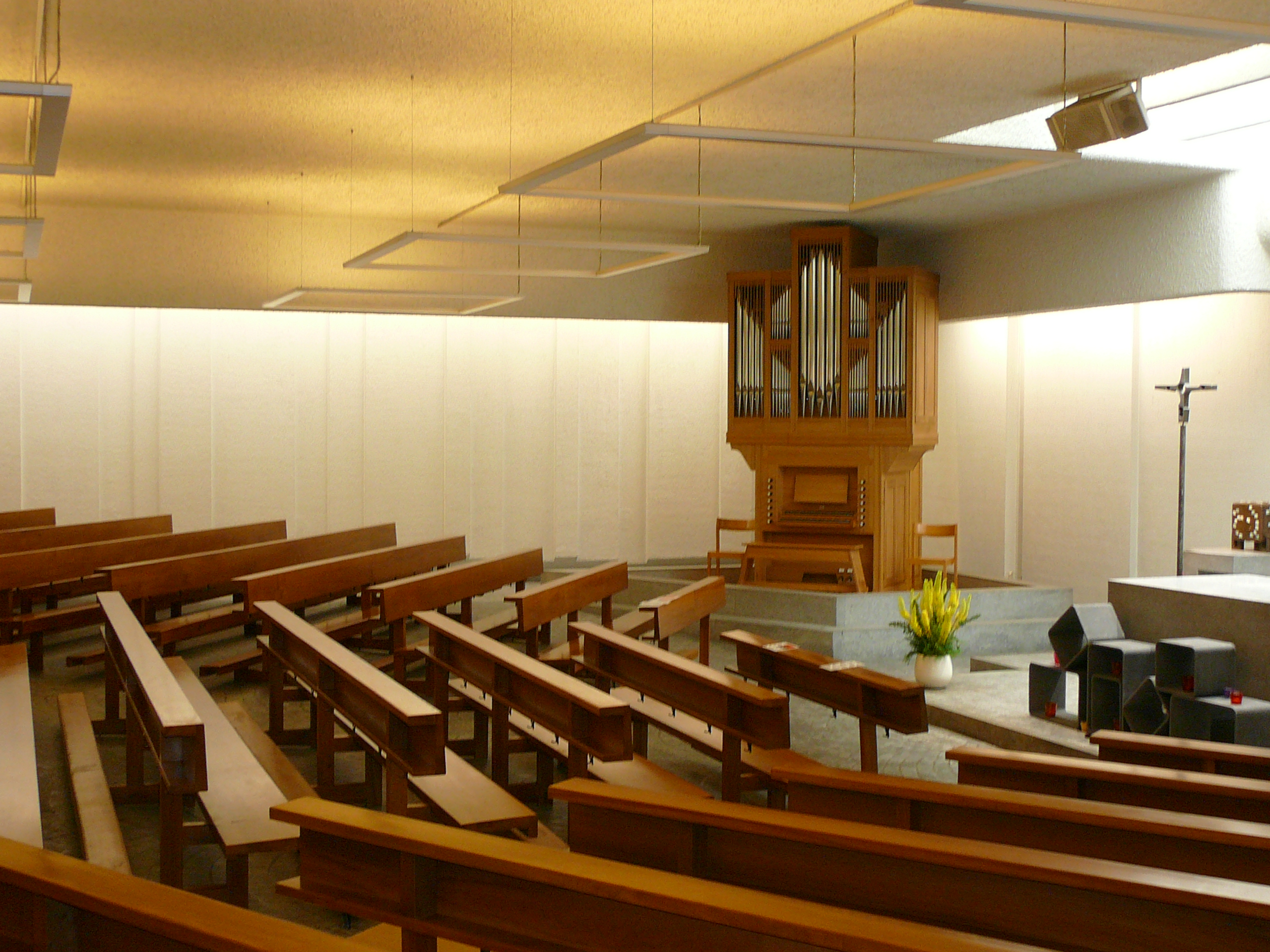 Römisch-katholische Kirche Herz Jesu Zürich-Wiedikon Unterkirche